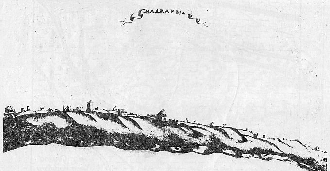 Развалины Маджарских мавзолеев (рисунок)